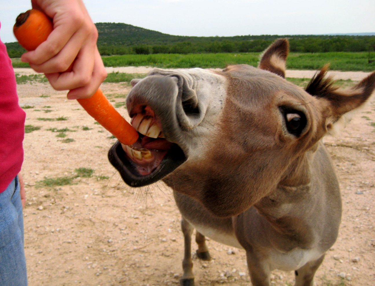 Mini-Donks & Carrots!